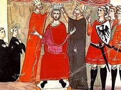 Korunovace Manfréda Sicilského (1258)